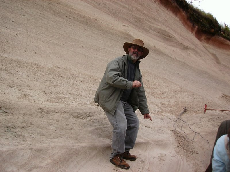 Professor Jurandyr Ross em meio ao arenito botucatu.